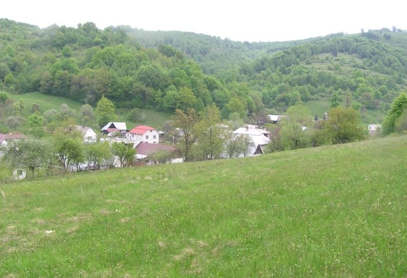 Celkový pohľad